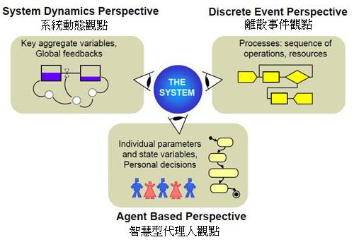 AnyLogic模擬語法